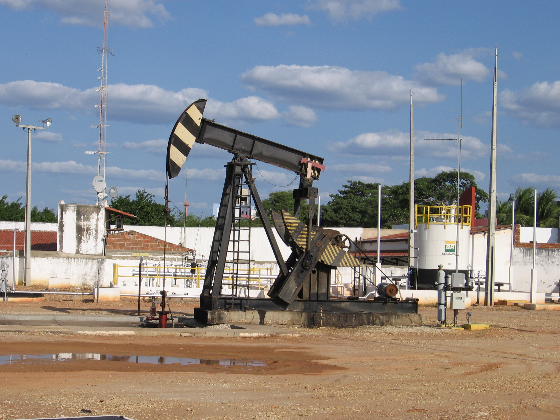 Cavalo mecânico em Mossoró, Rio Grande do Norte, Brasil.